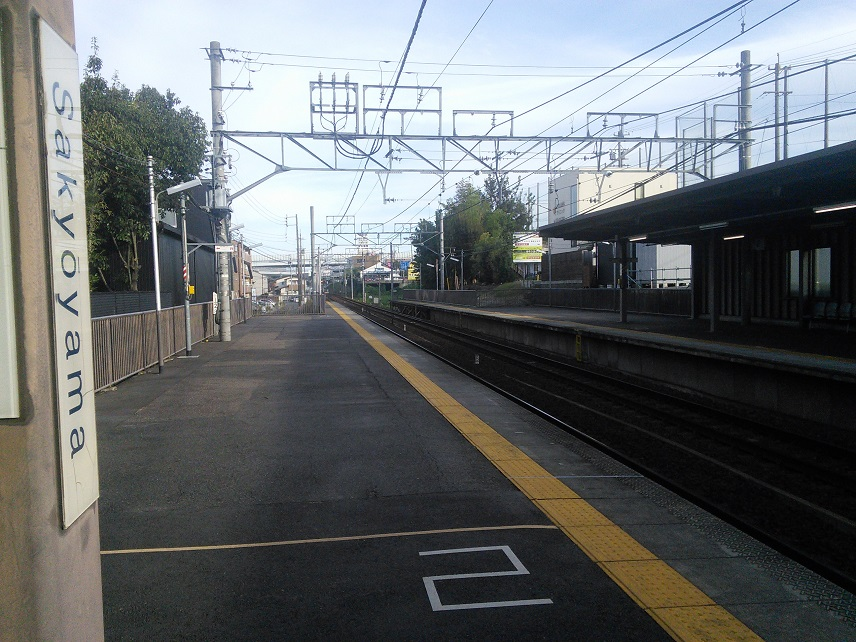 Sakyoyama station platform